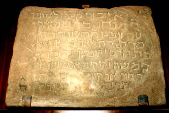 a stone plaque commemerating a donation to a synagogue in Strasbourg in the 12th century